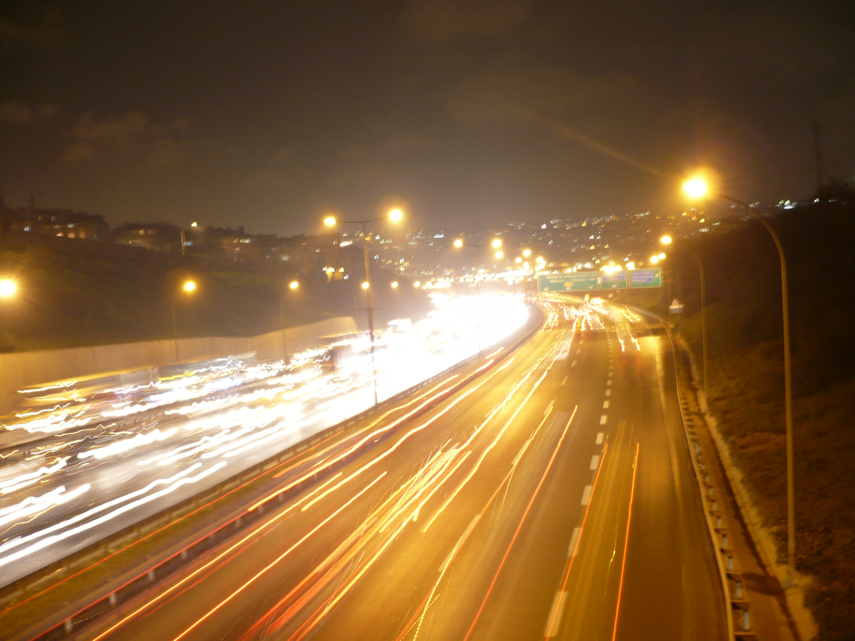 Otoyol 1, İstanbul Haliç Köprüsü Halıcıoğlu çıkışı / Otoyol 1, İstanbul Haliç Bridge Halıcıoğlu exit